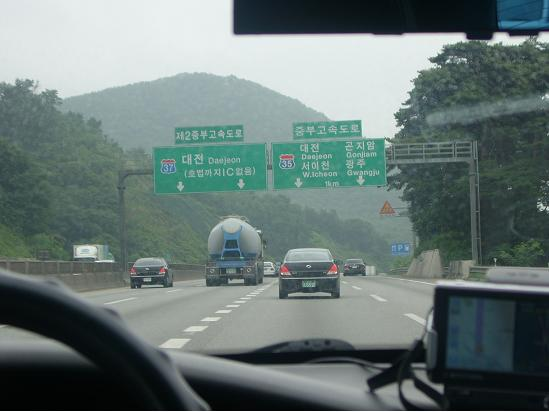 Sangok JCT Jungbu-Expressway KOREA